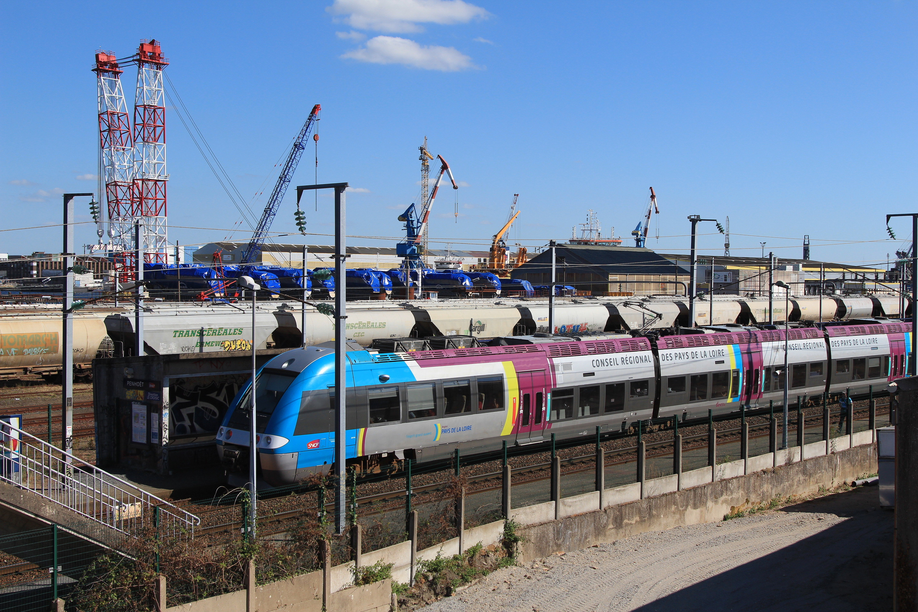 Une ZGC assurant le TER 58033 (Nantes - Le Croisic) repart de la gare de Penhoët. En fond : les installations des Chantiers de l'Atlantique